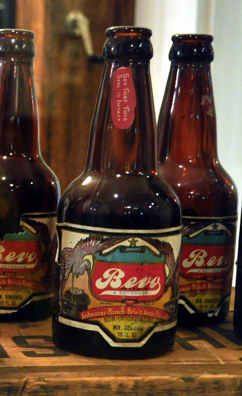 Einige historische Flaschen Bevo.